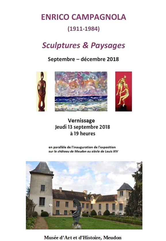 image illustrant une exposition à Meudon d'Enrico Campagnola